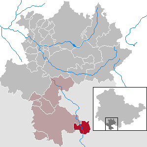 Ummerstadt in Thuringia - district Hildburghausen